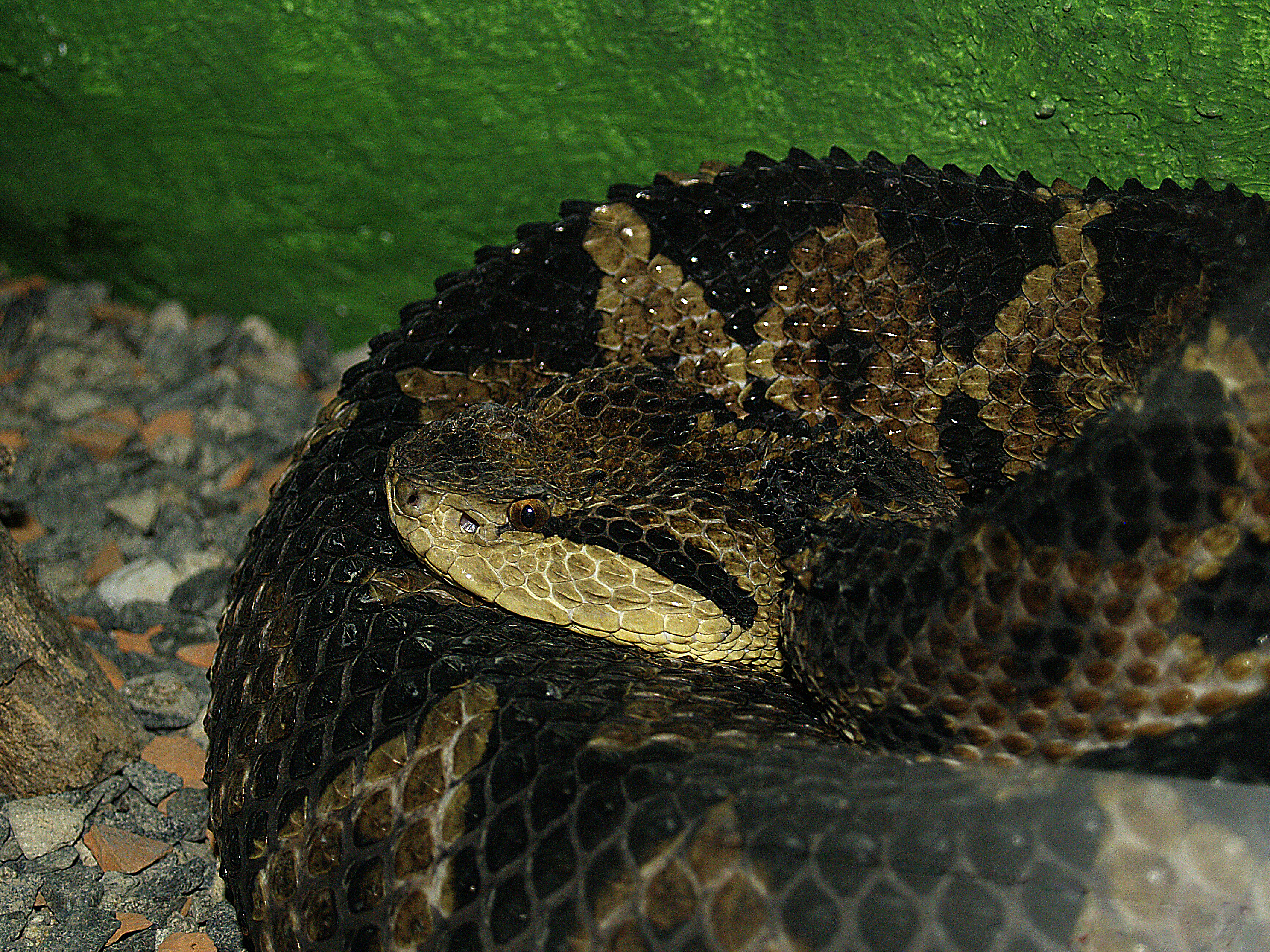 Mano de piedra, Central American jumping pitviper, (Atropoides nummifer mexicanus, also known as Atropoides mexicanus), Serpentario El Picacho